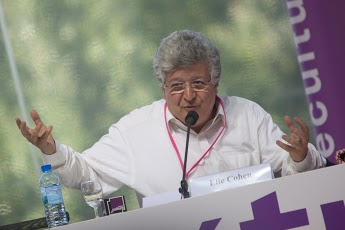 Elie Cohen à l'université d'été du MEDEF 2010